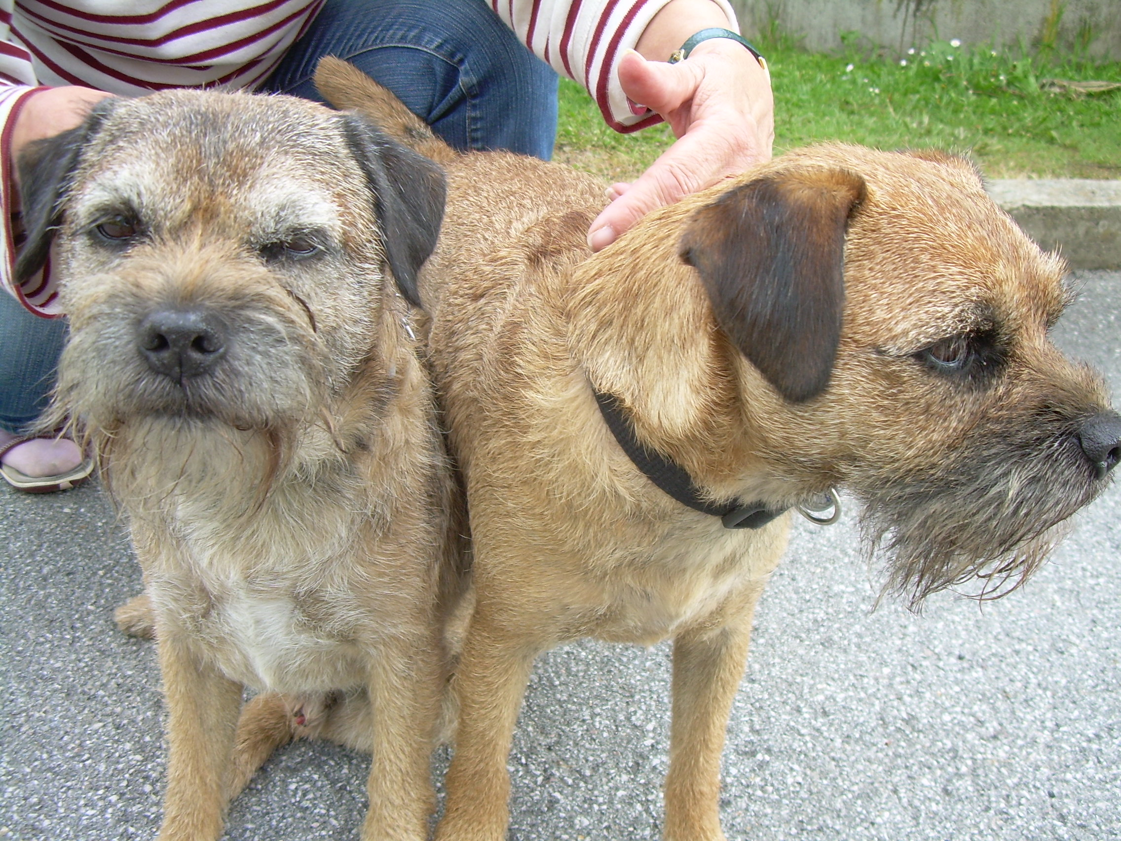 Foulques von Skilos de la Cocagne et de Figaro du Rocher qui pleure.